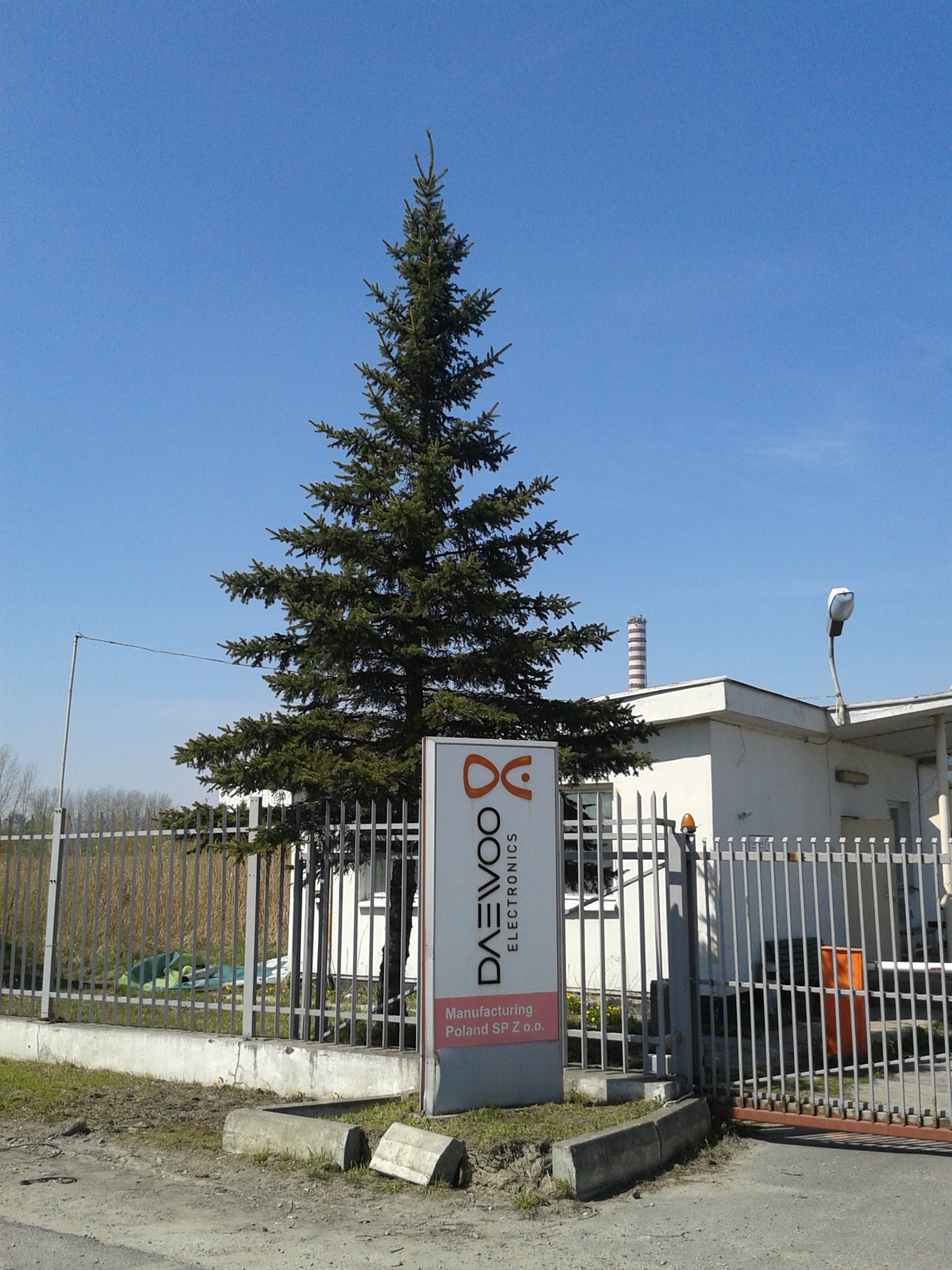 Teren dawnej fabryki telewizorów Daewoo w Pruszkowie-Gąsinie